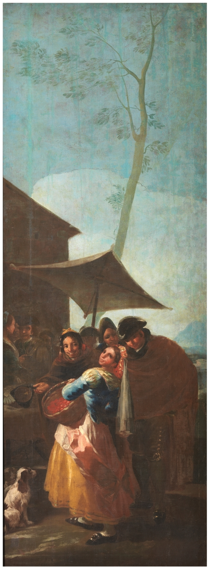 Cartones para tapices.